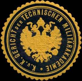 Sealing stamp Title: K.u.K. Gericht der Technischen Militärakademie Description: gelb, schwarz, geprägt Place: size: 4 cm